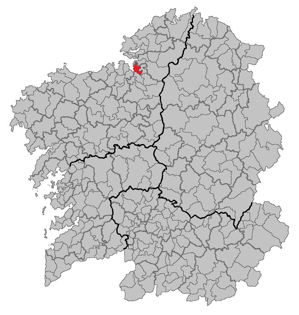 Mapa coa localización do concello de Miño, A Coruña.